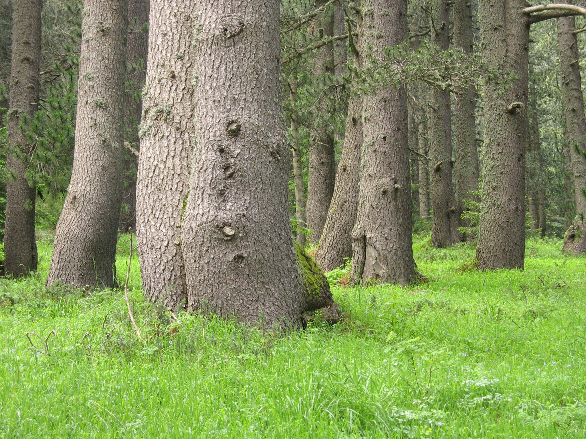 Pinus heldreichii, Pirin National Park, Bulgaria